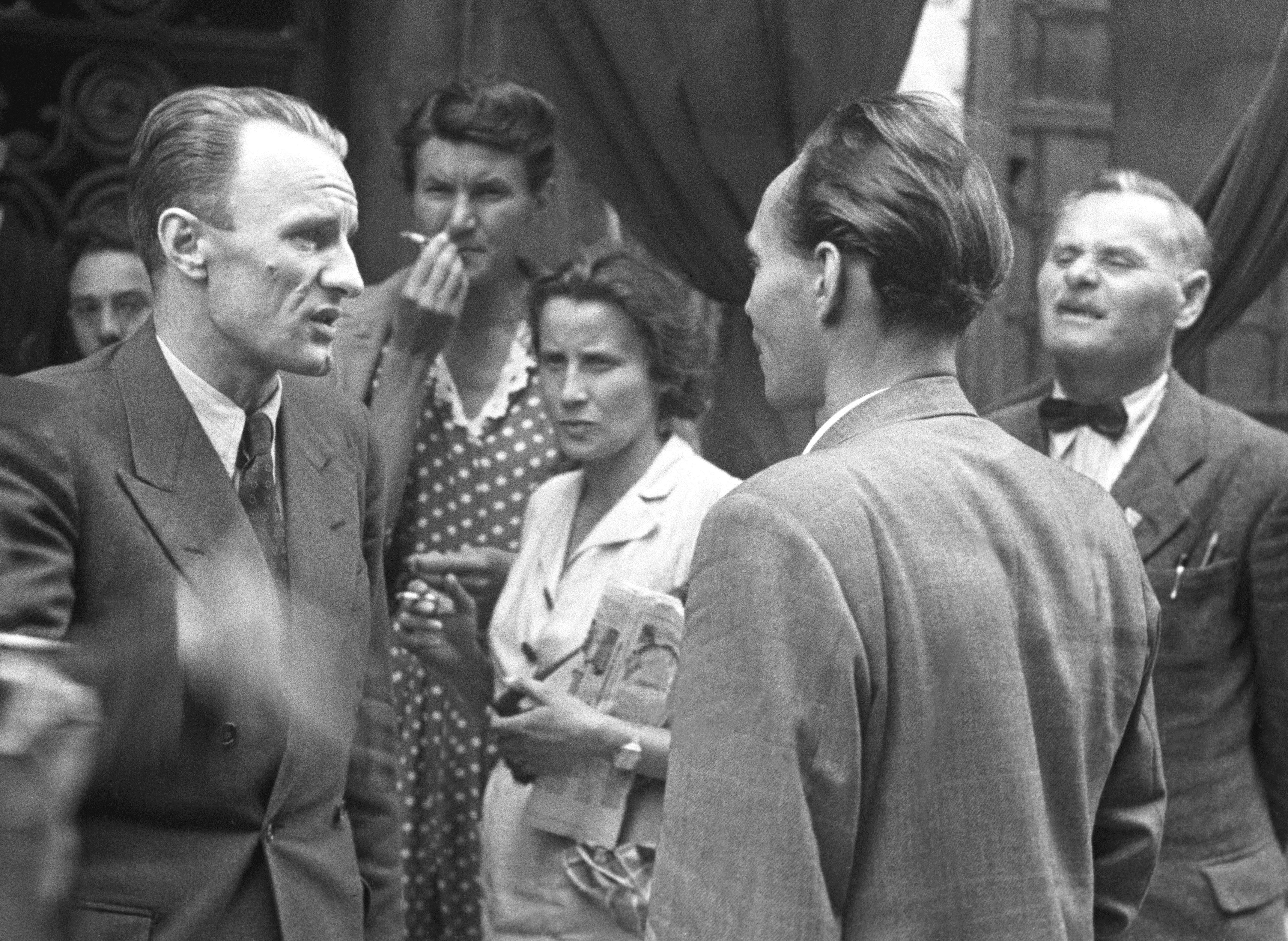 1945. májusa. Kádár János és Rajk László, a Magyar Kommunista Párt Központi Vezetőségének tagjai az MKP első országos értekezletén. A háttérben Rajk Lászlóné Földi Júlia (balra)